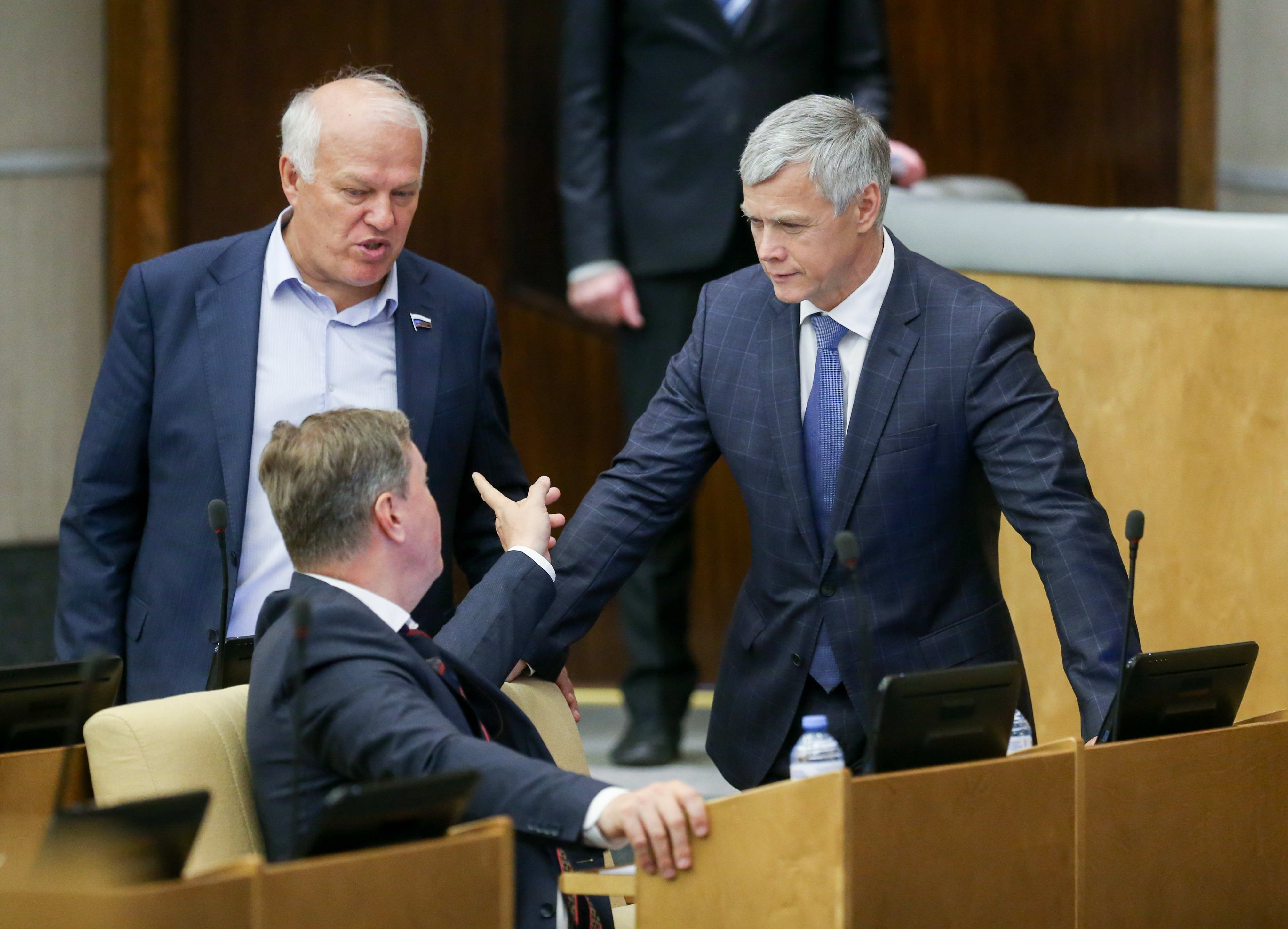 Депутаты Госдумы, члены фракции "Справедливая Россия" Анатолий Грешневиков, Валерий Гартунг и Олег Нилов